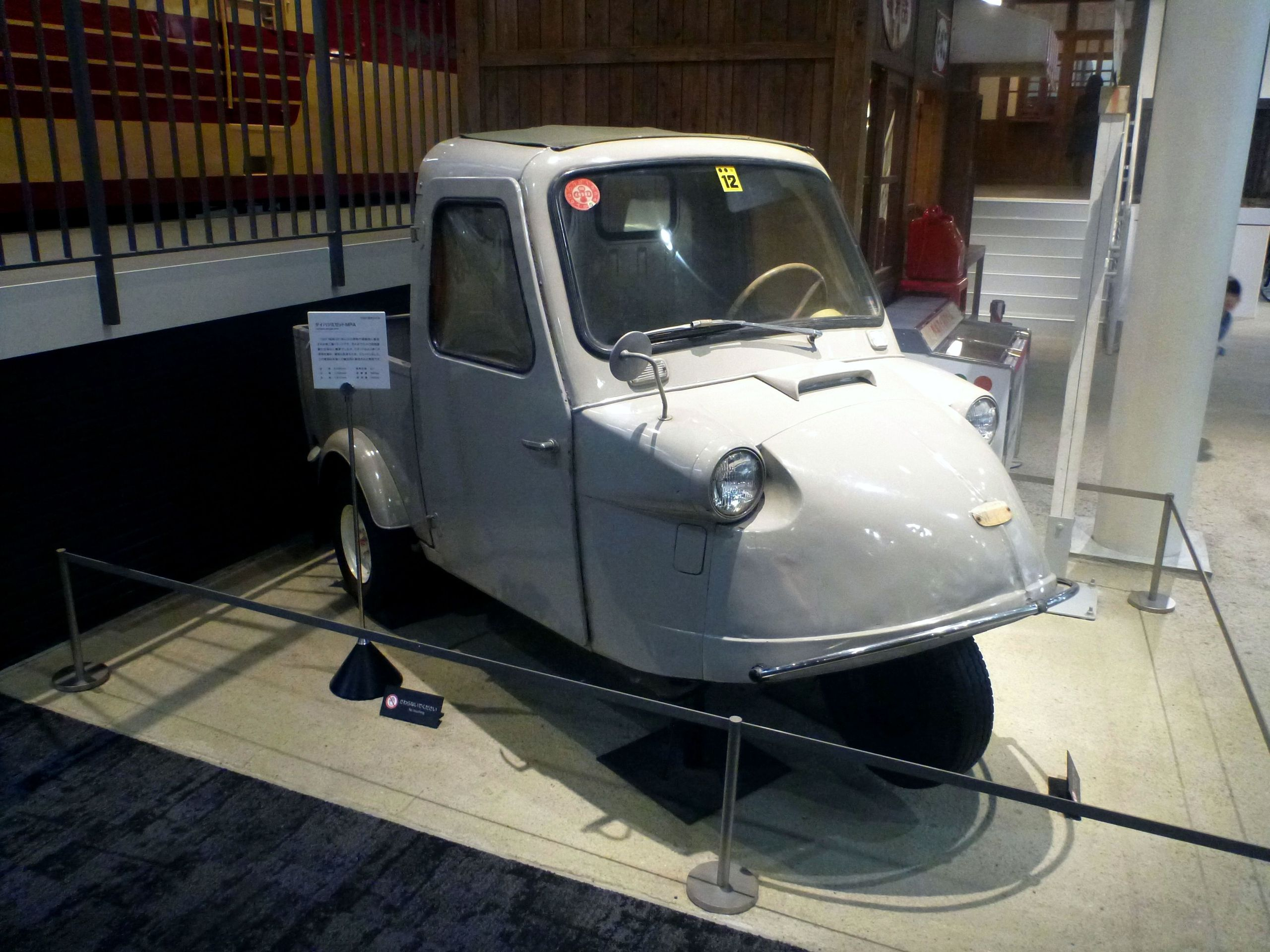 Kyoto Railway Museum